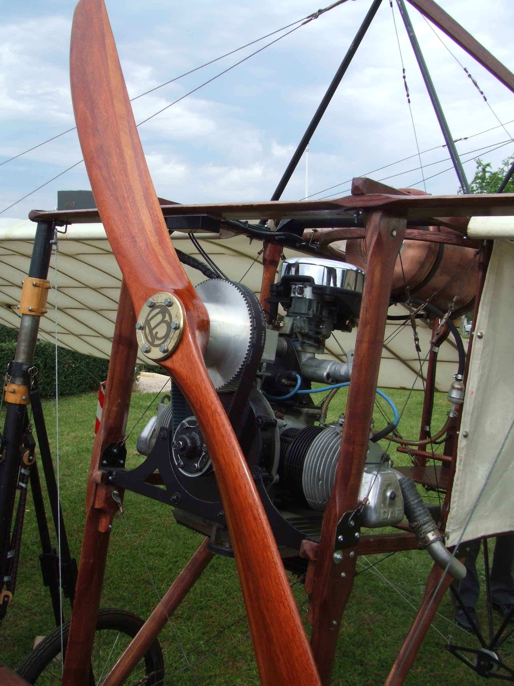 Reconstitution de l'avion de Pégoud présentée le 11/09/2011 à Montferrat